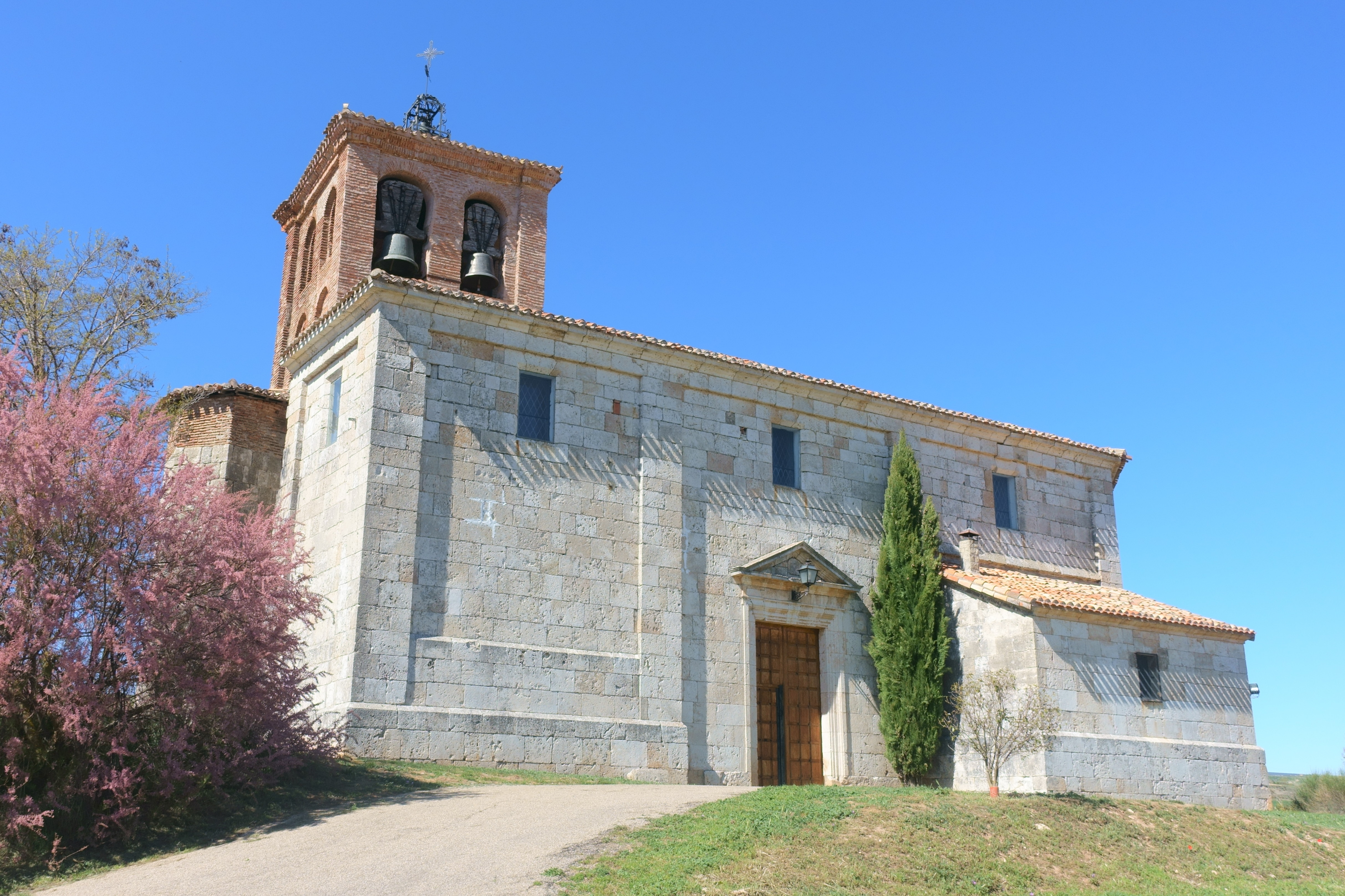 Iglesia de San Pedro, Villariezo (Burgos, España).